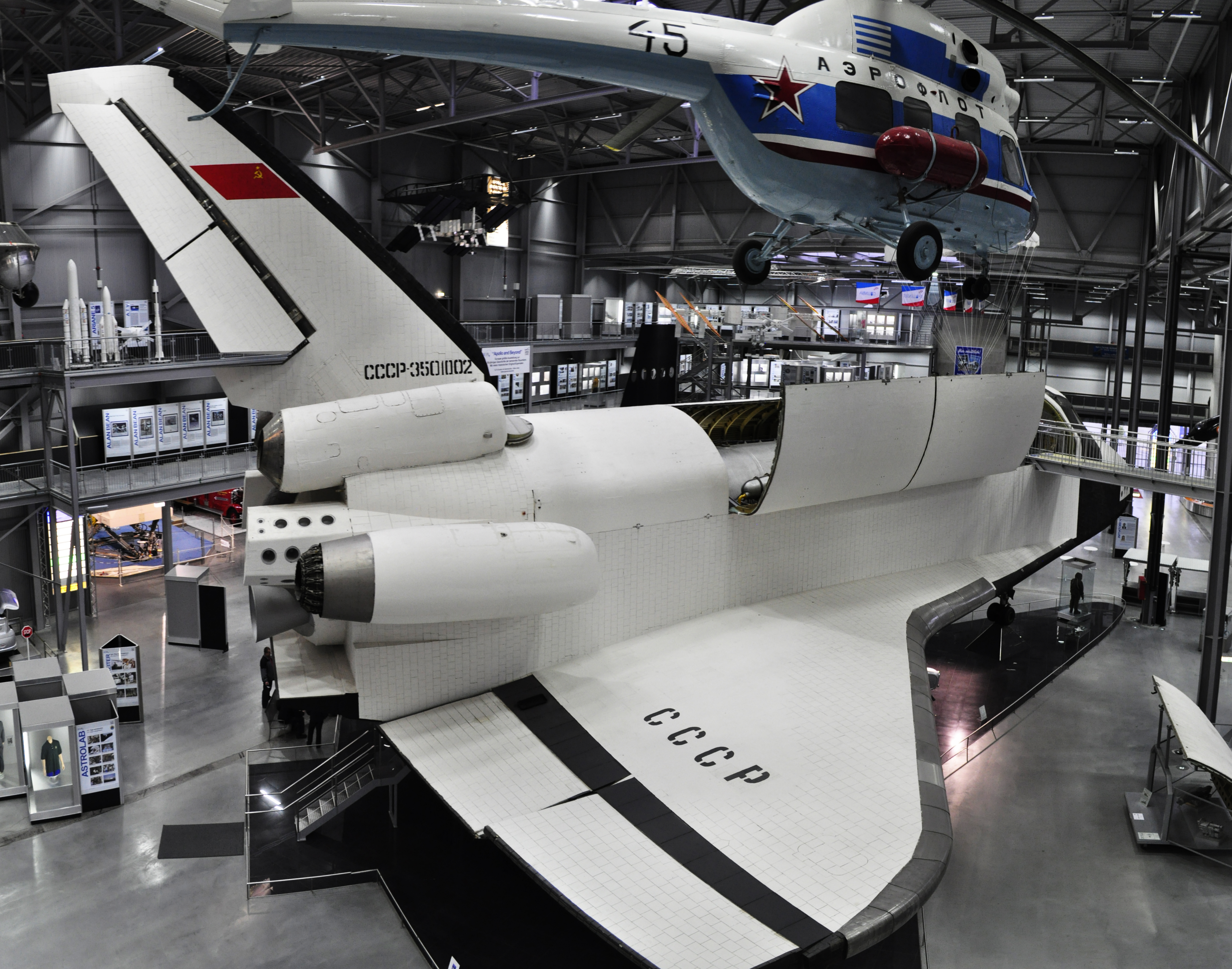 Raumfahrthalle mit Buran Technik-Museum Speyer